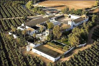 Hacienda de Torrenueva o Mateo Pablo, Alcalá de Guadaíra (Sevilla, España)